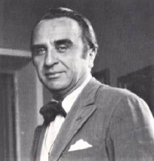 Amerigo Bartoli Natinguerra